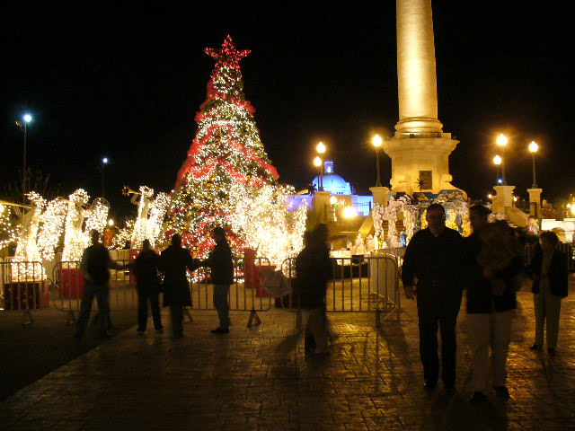 Chihuahua Plaza Mayor durante Navidad